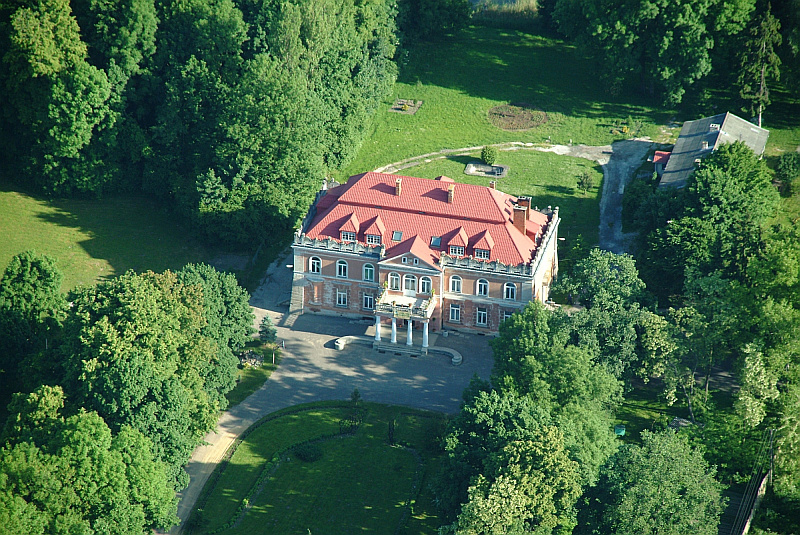 Pałac w Janowie, obecnie siedziba Zespołu Szkół Agrotechnicznych